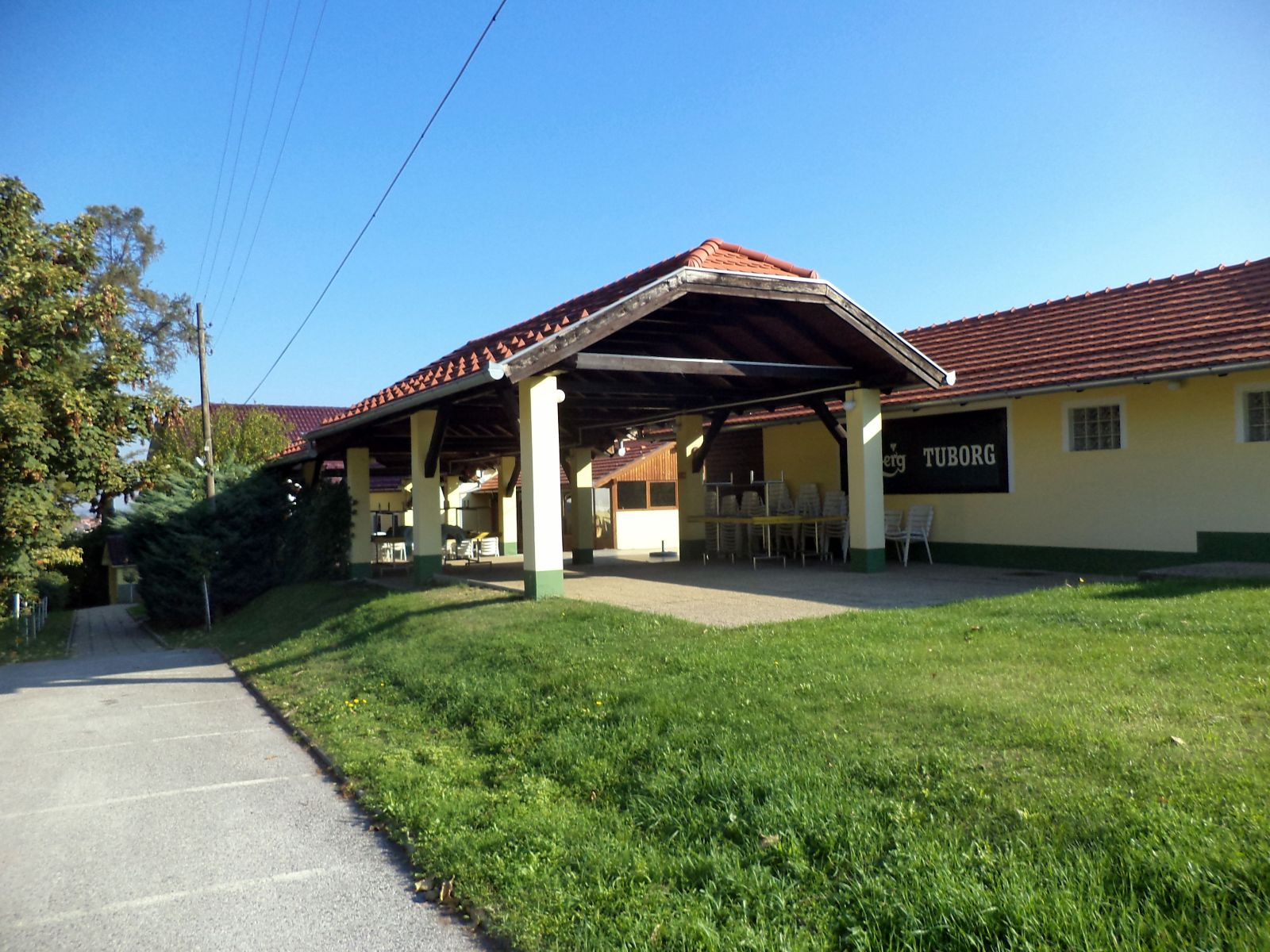 Črni Bel, Ludbreg